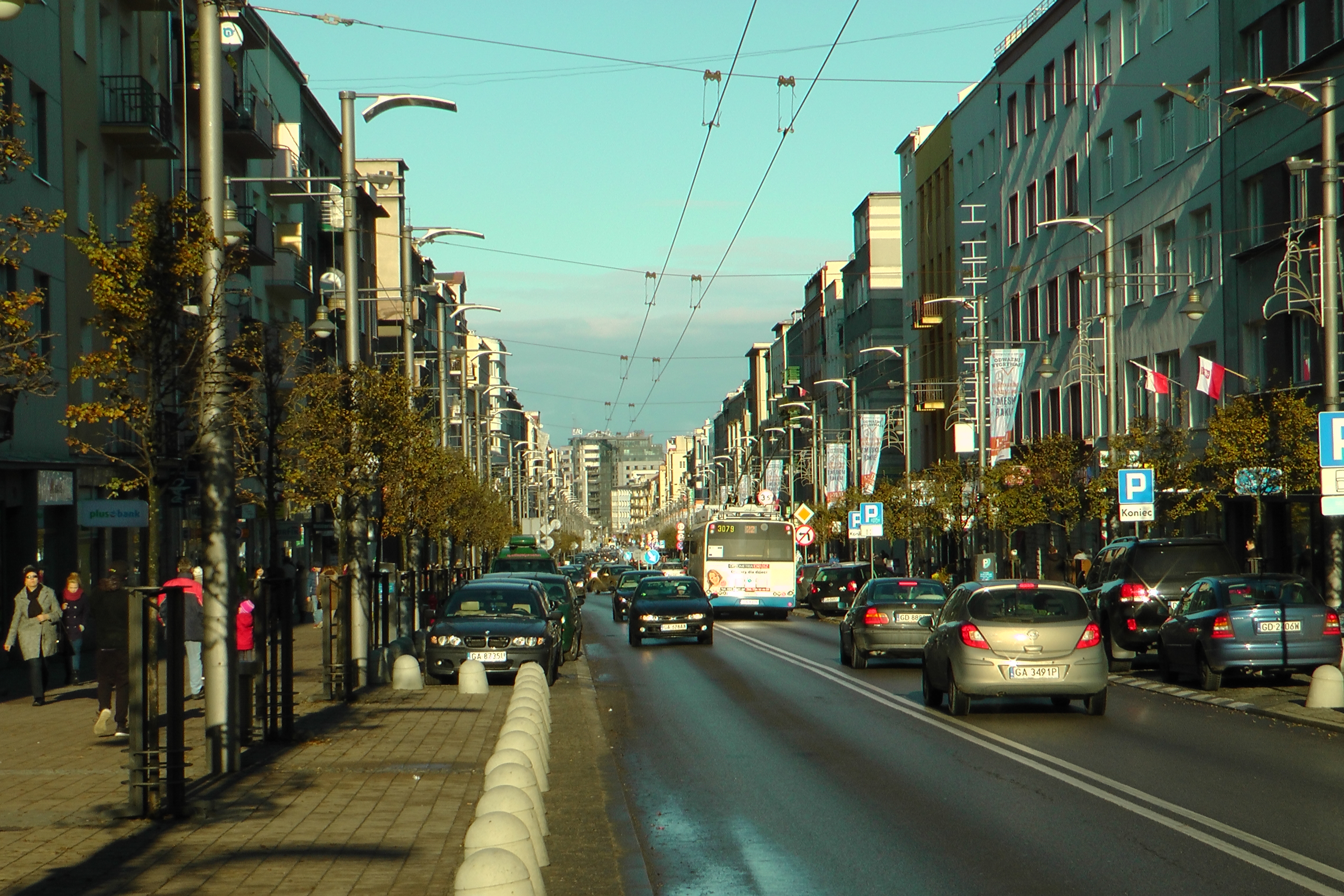 ul Świętojańska widok w stronę Placu Kaszubskiego